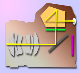 Este esquema es obra mia. I'm the autor.